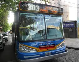 Colectivo de la línea 303 en su trayecto por San Miguel